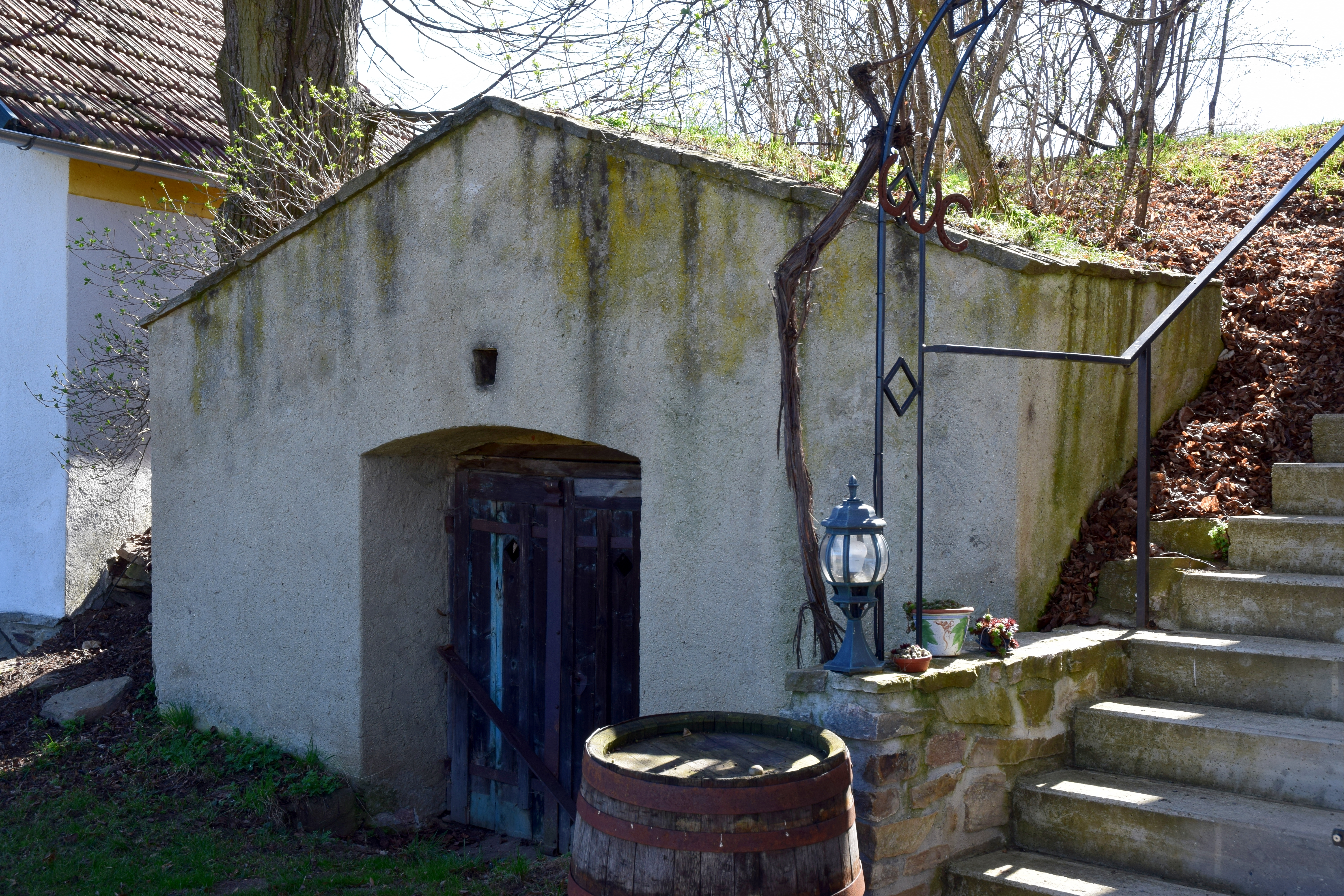 Objekt in der Kellergasse An der Straße Richtung Horn in der KG Mödring in Horn (Niederösterreich)